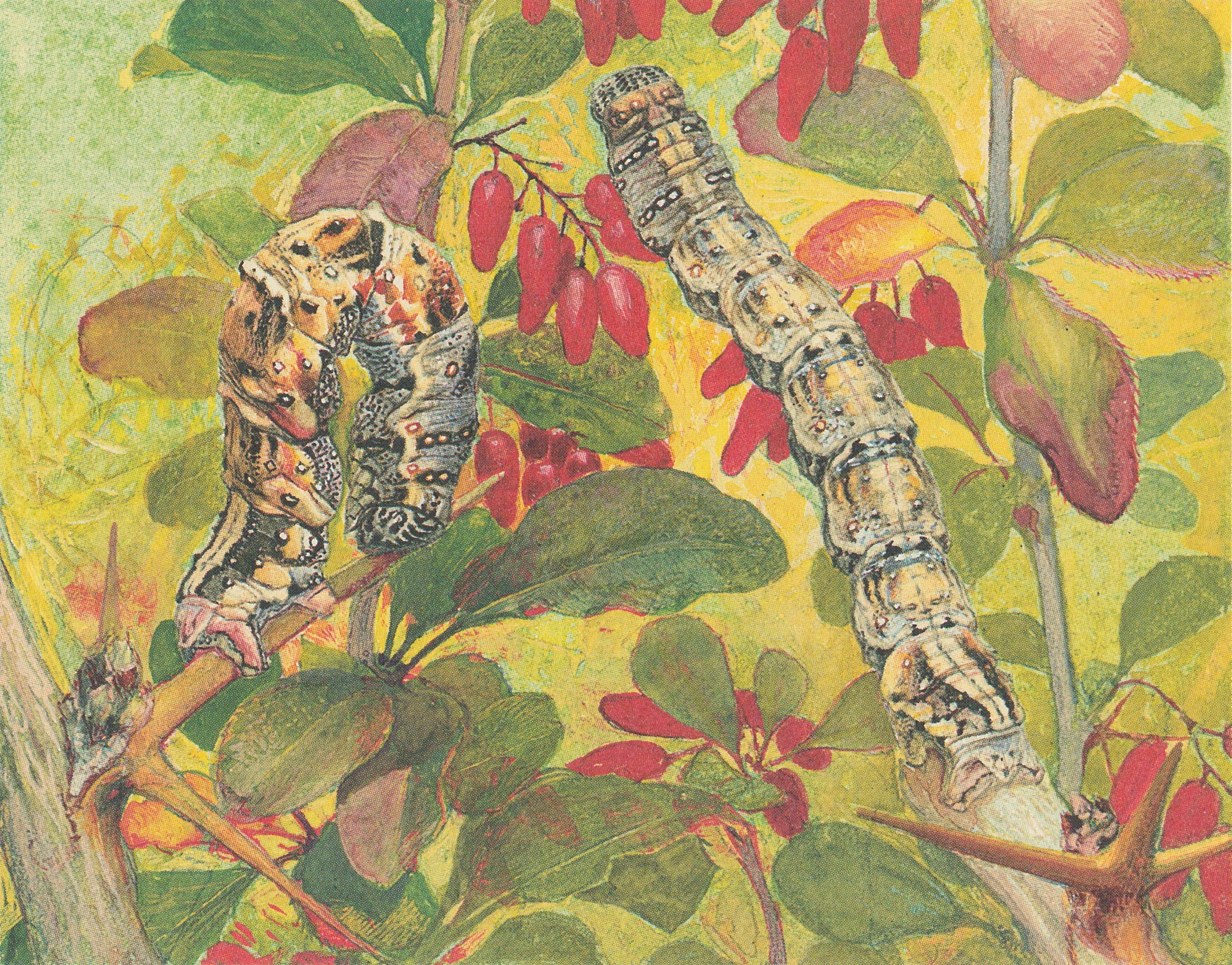 Raupen des Berberitzenspanners (Pareulype berberata) auf einer Gewöhnlichen Berberitze (Berberis vulgaris)